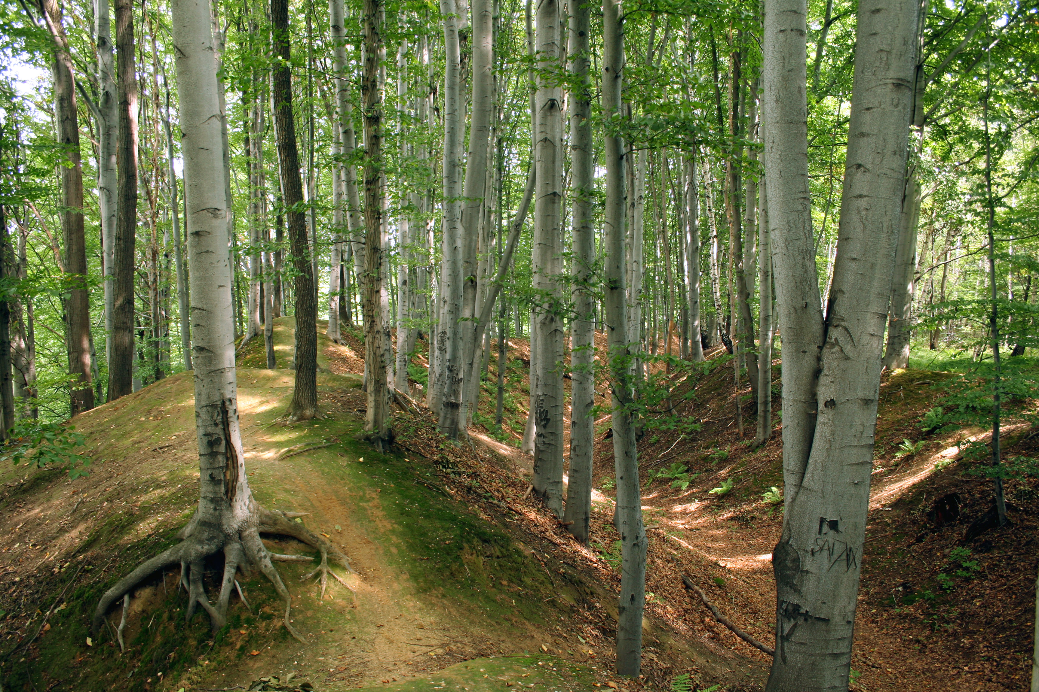 gordzisko_Lubomii, powiat wodzisławski, fragment od strony zachodniej